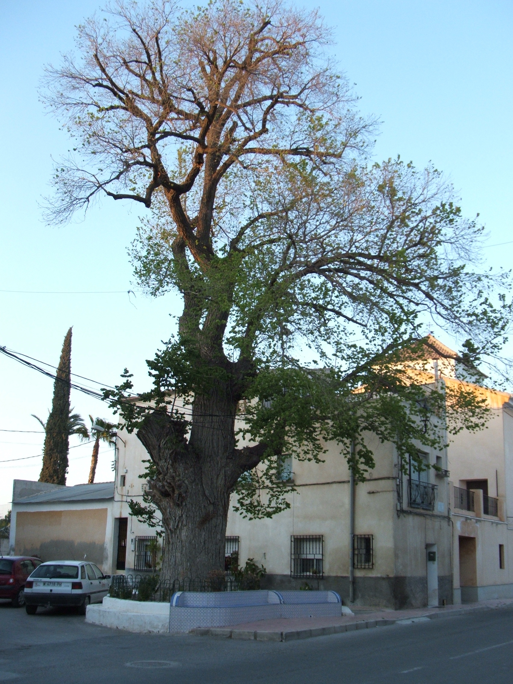 olmo cente